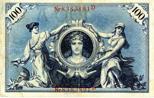 Autore: Rdb Bild:100 Goldmark.jpg categoria:Immagini di banconote